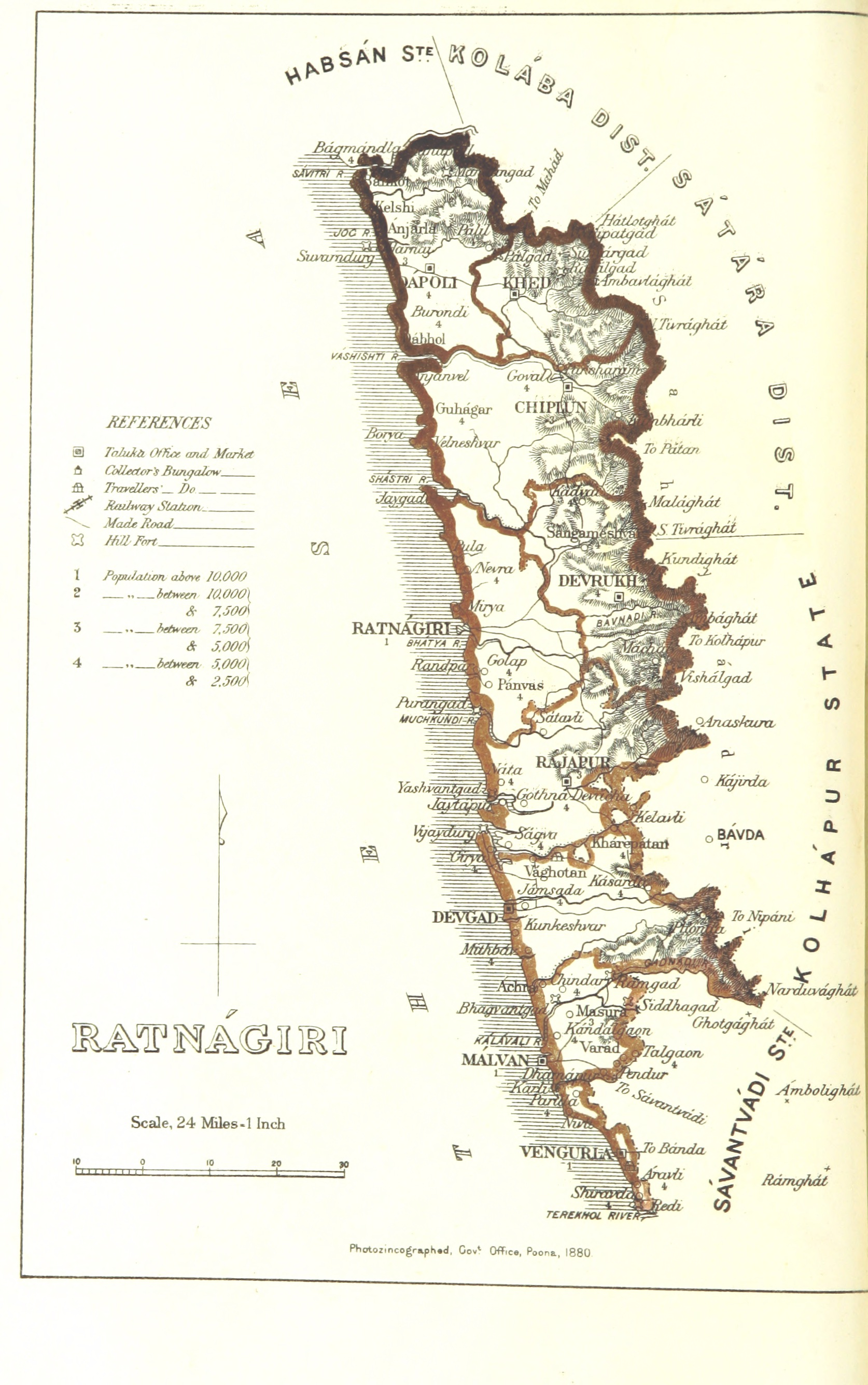 Ratnagiri district 1896